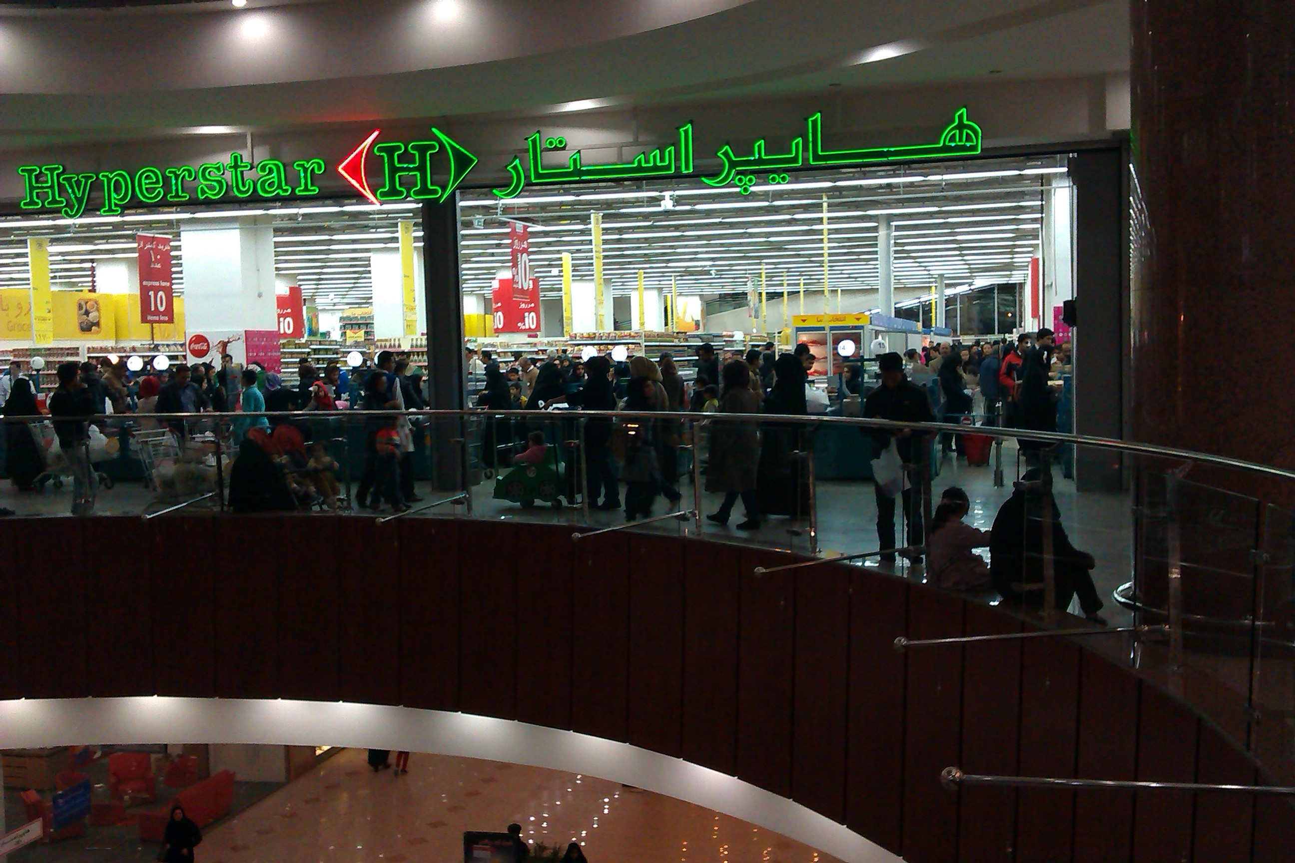 hyper star